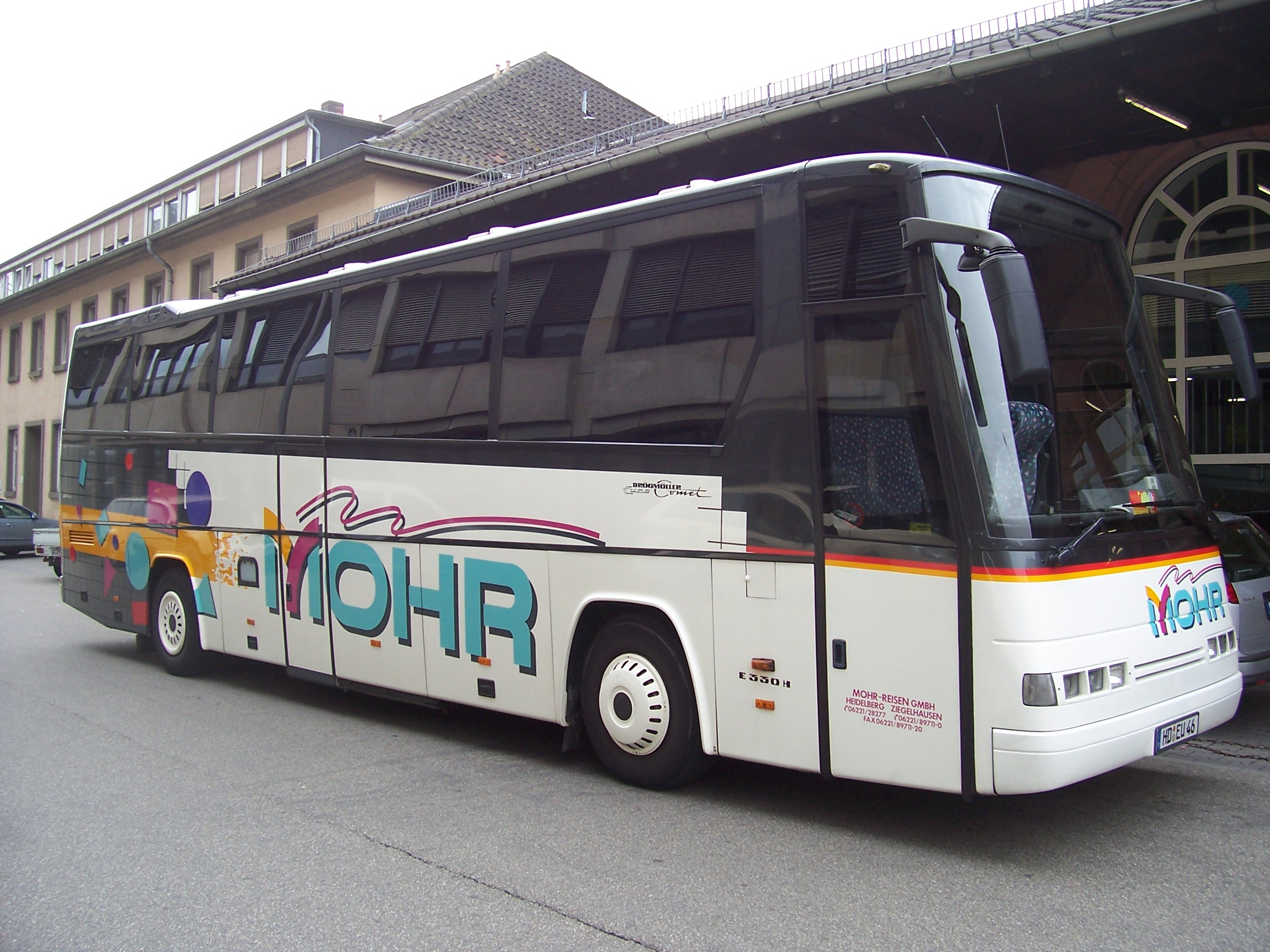 Ein Drögmöller EuroComet E 330 H in Mannheim.